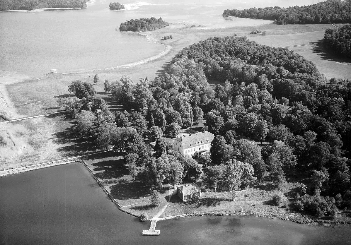 Flygfoto över Ådö gård, Låssa socken, Uppland 1963